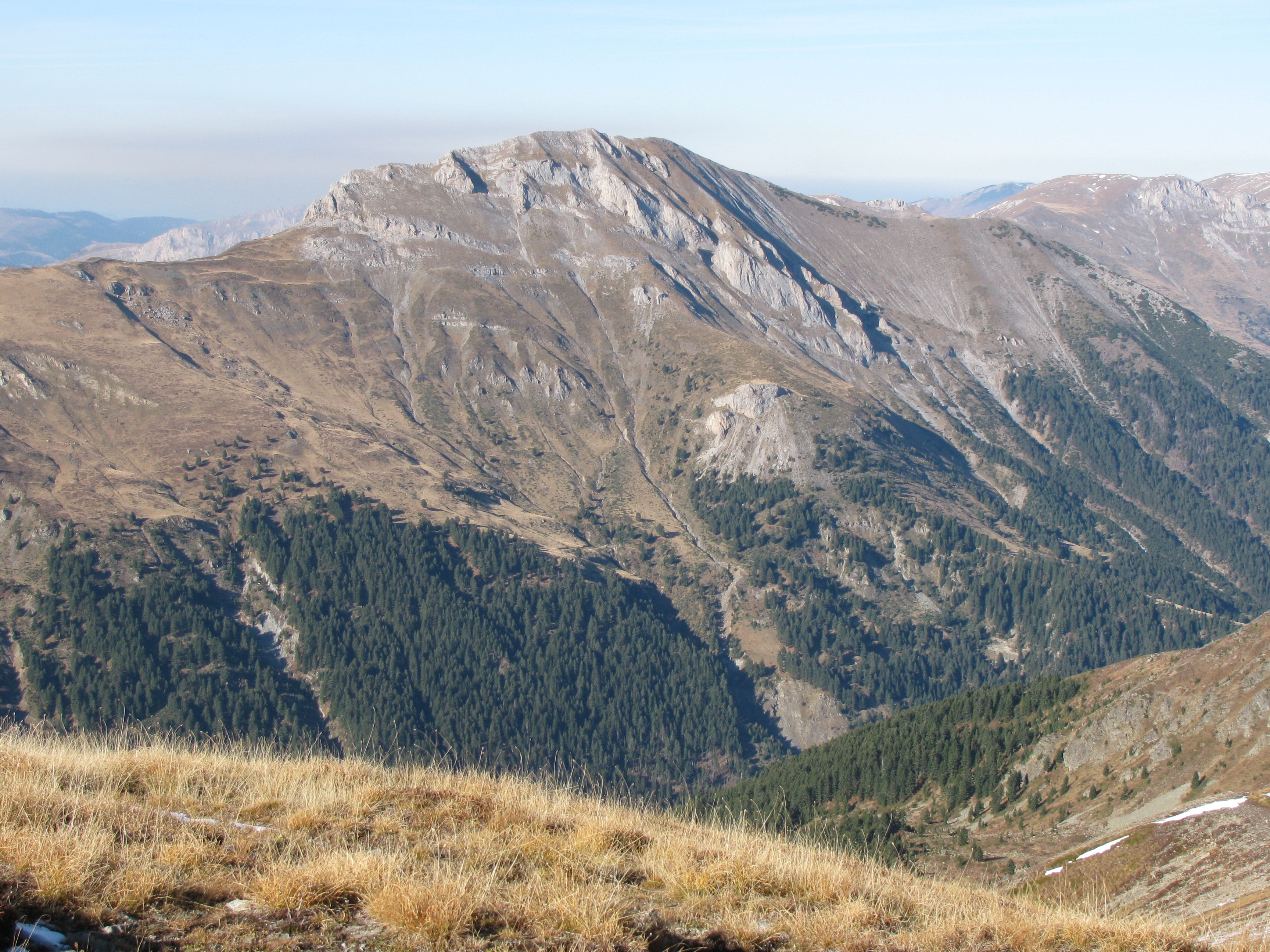 Maja e Ropsit, Deçan